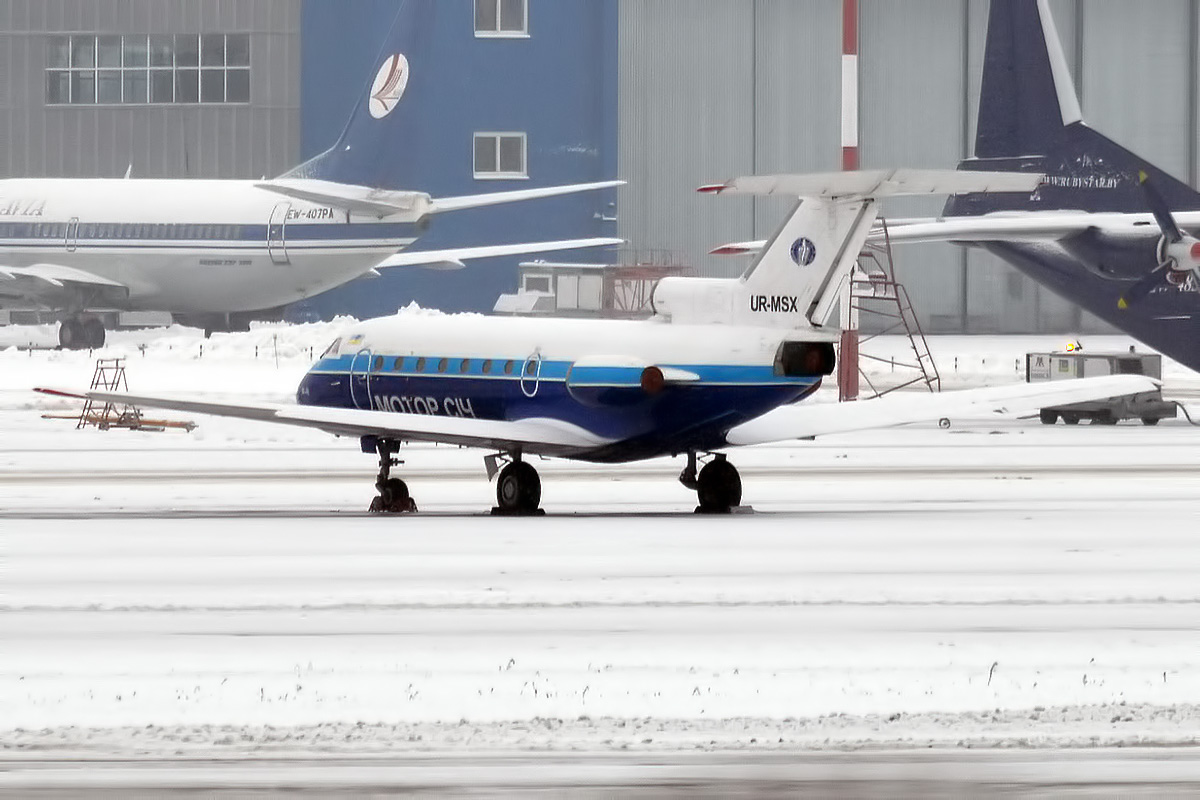 Motor Sich Airlines, UR-MSX, Yakovlev Yak-40